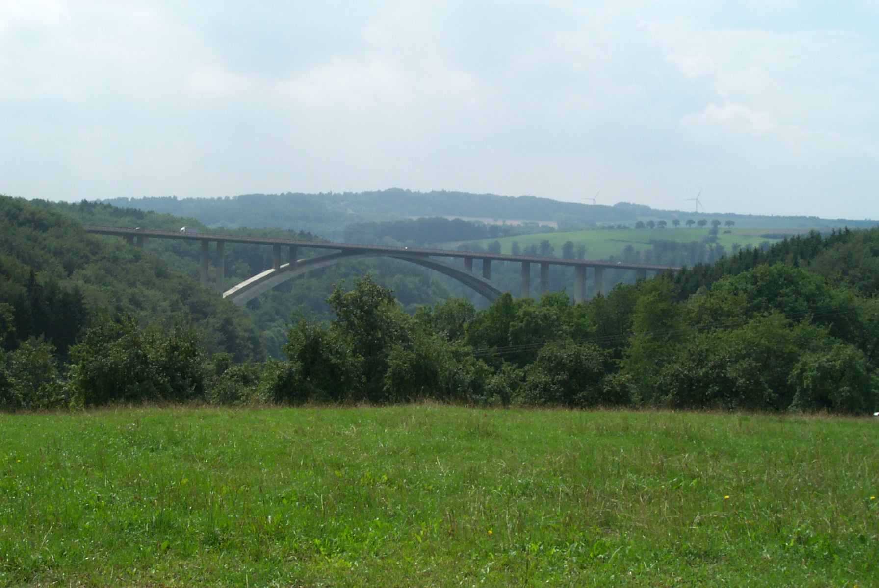 Kylltalbrücke der Autobahn 60